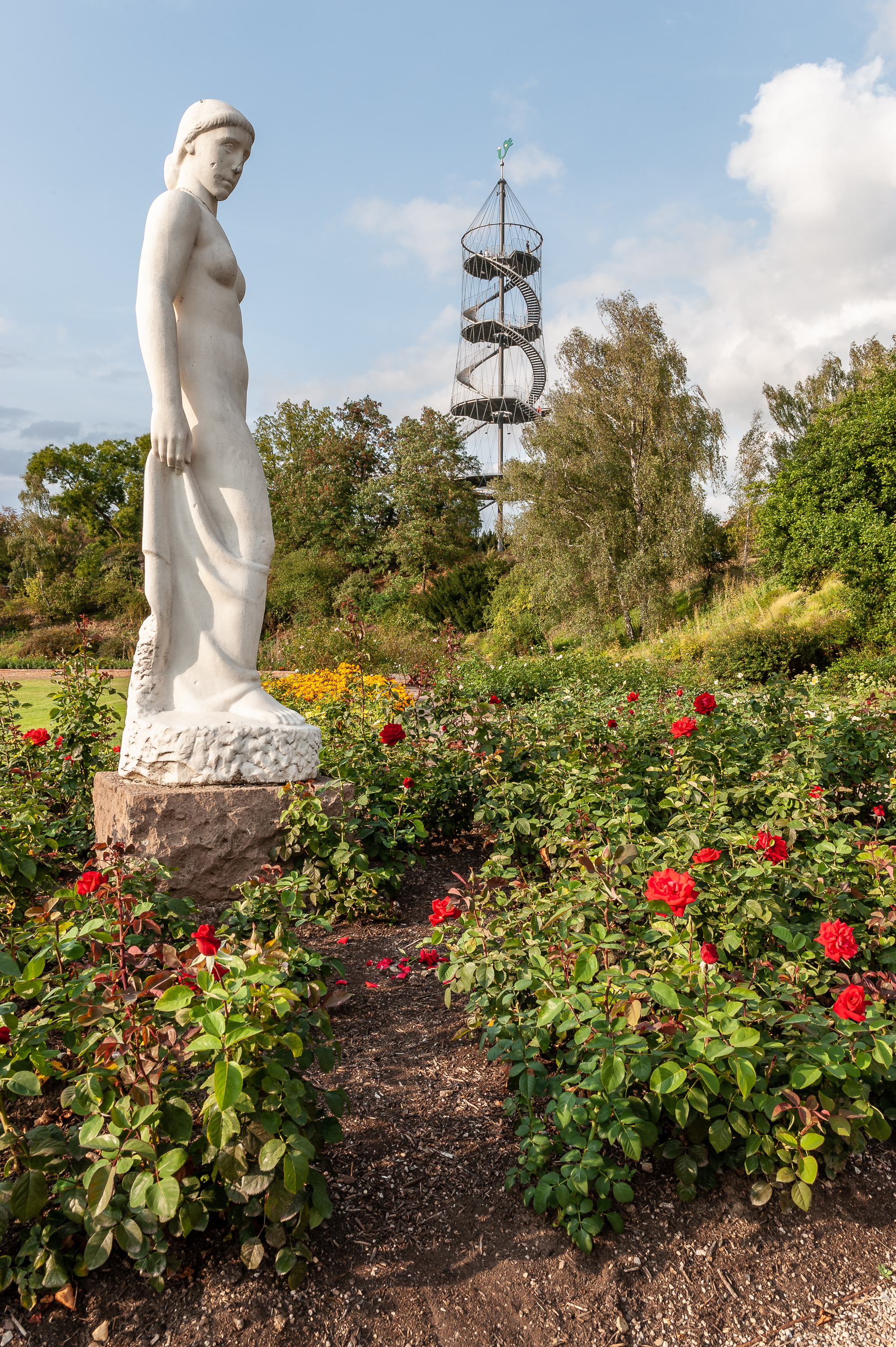 Rosengarten und Killesbergturm, Stuttgart